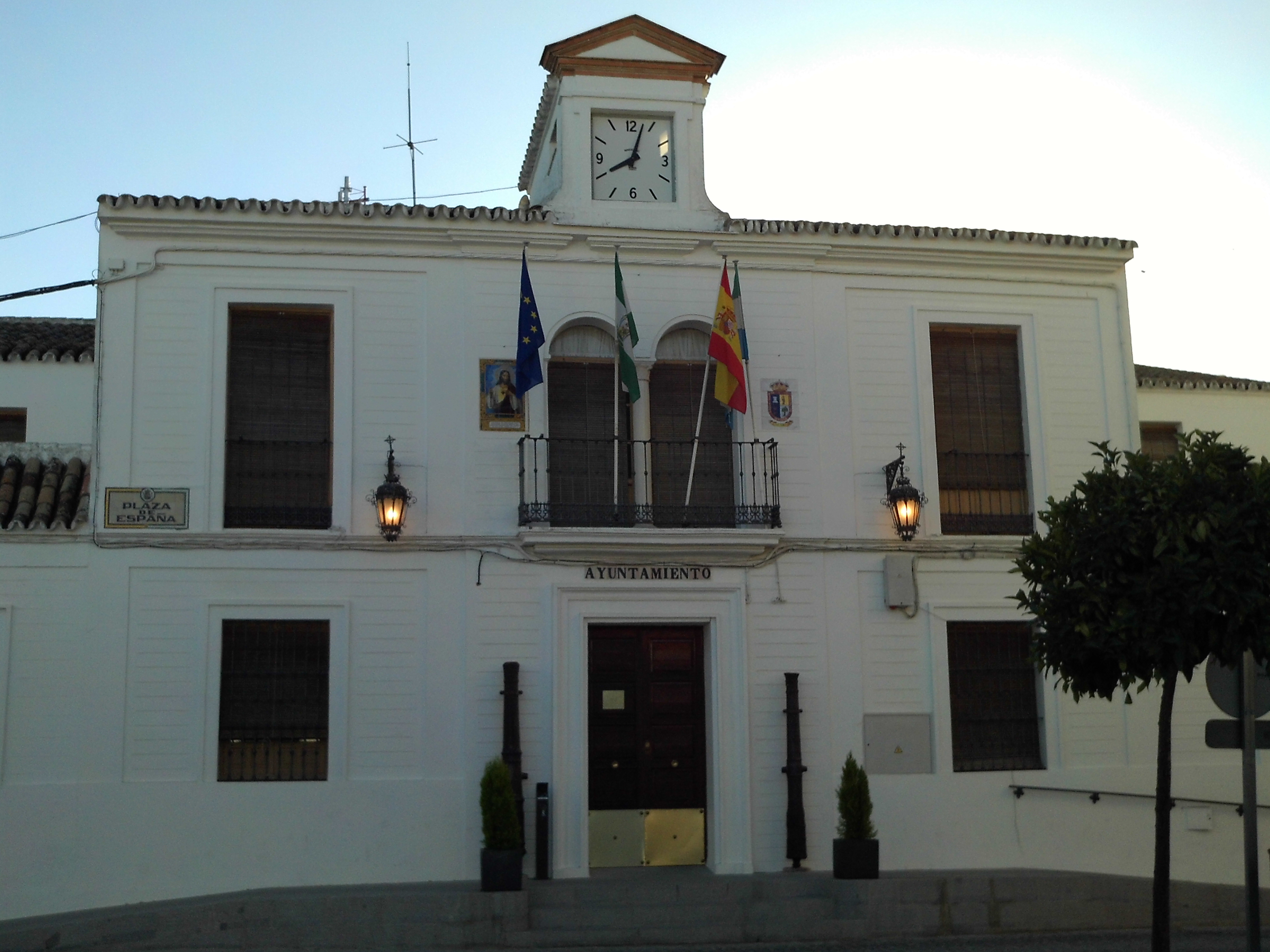 Ayuntamiento de Salteras, en la plaza de España de la localidad